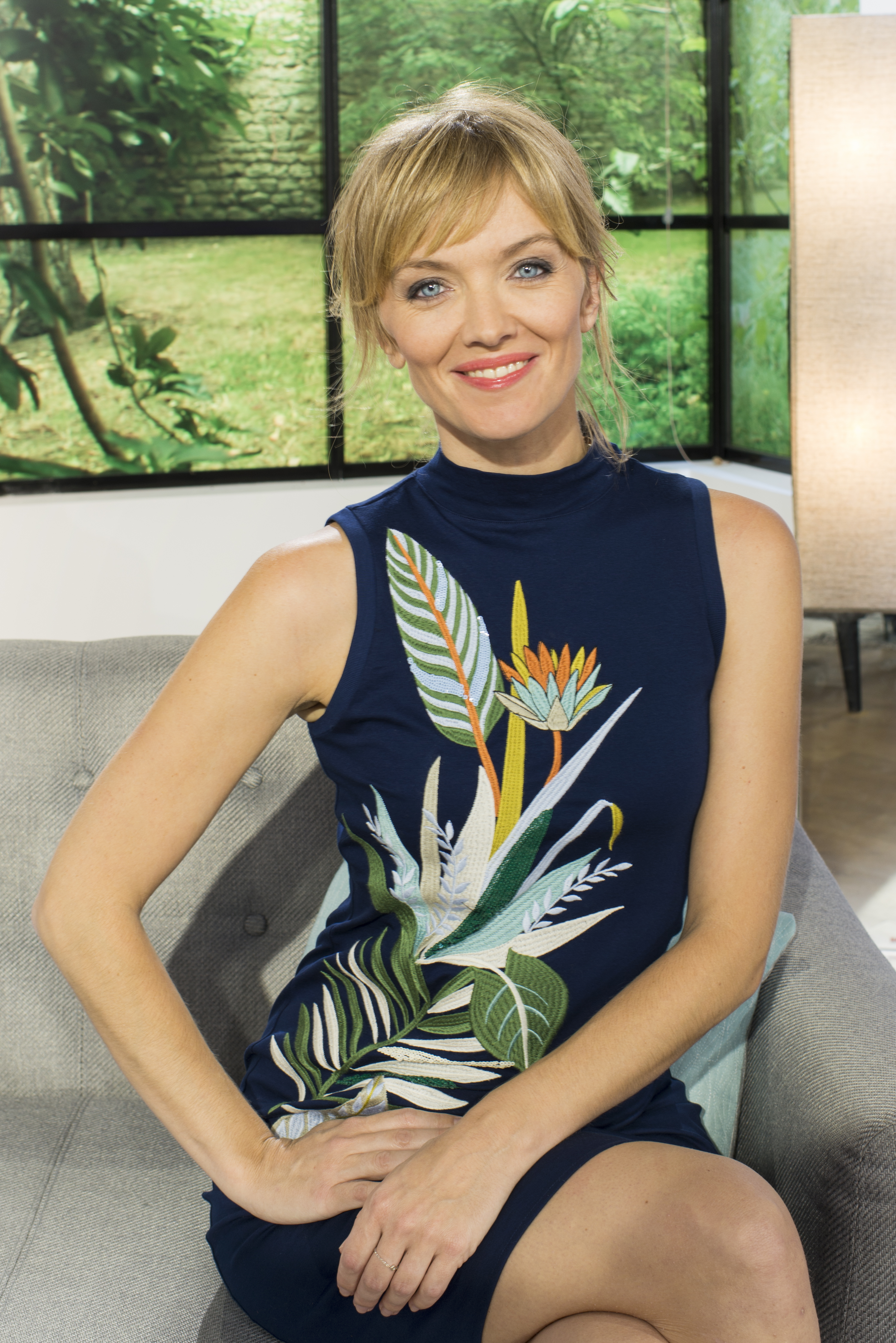 Maya Lauqué - La Quotidienne Saison 4 Photographe : Jérémie Lamarch